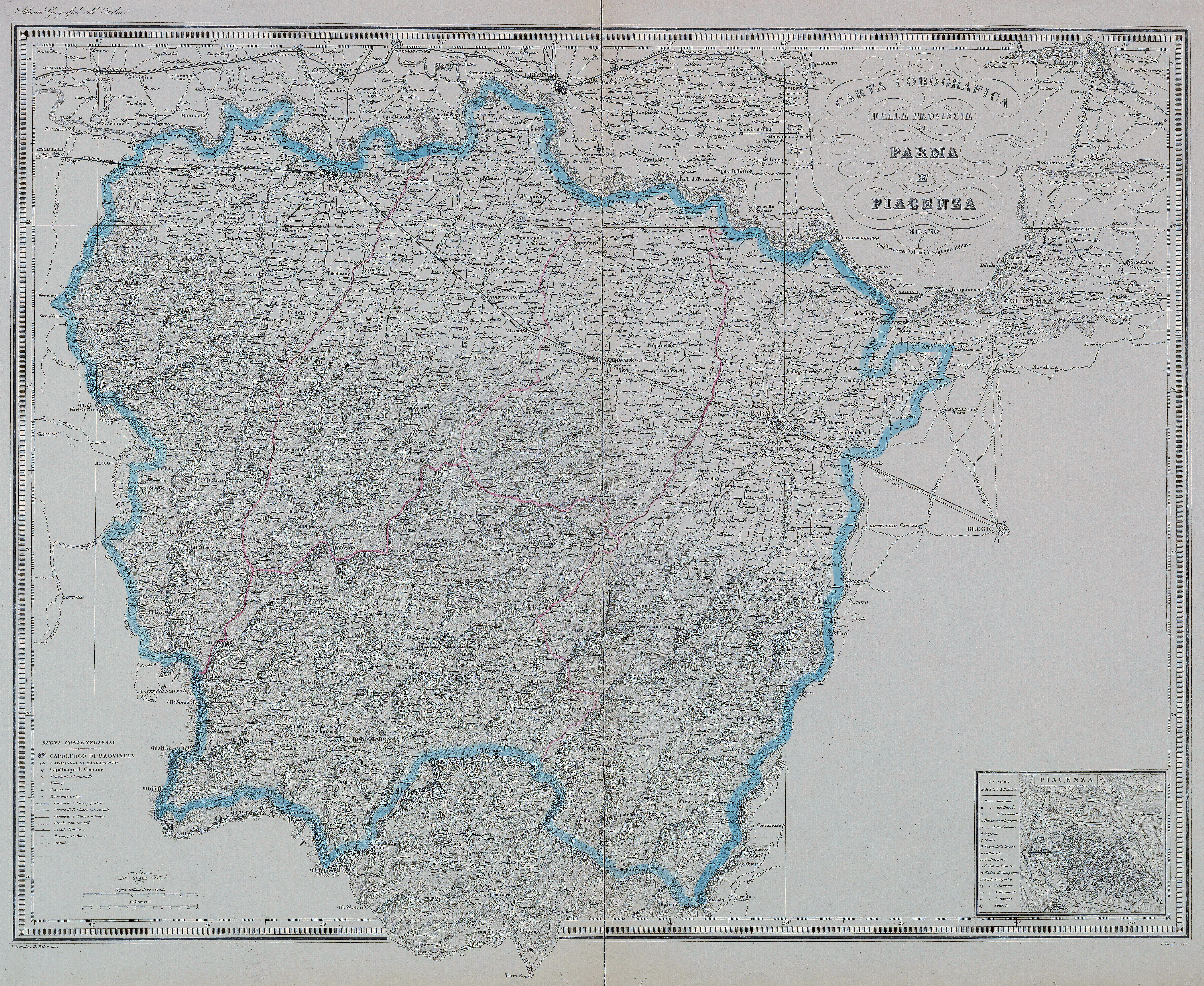 Province di Parma e di Piacenza